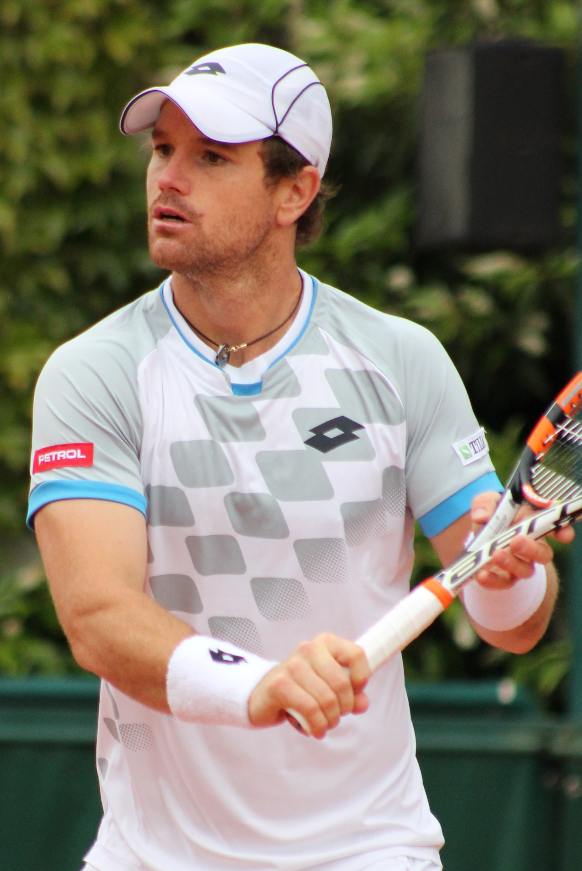 Kavcic RG15 (8)